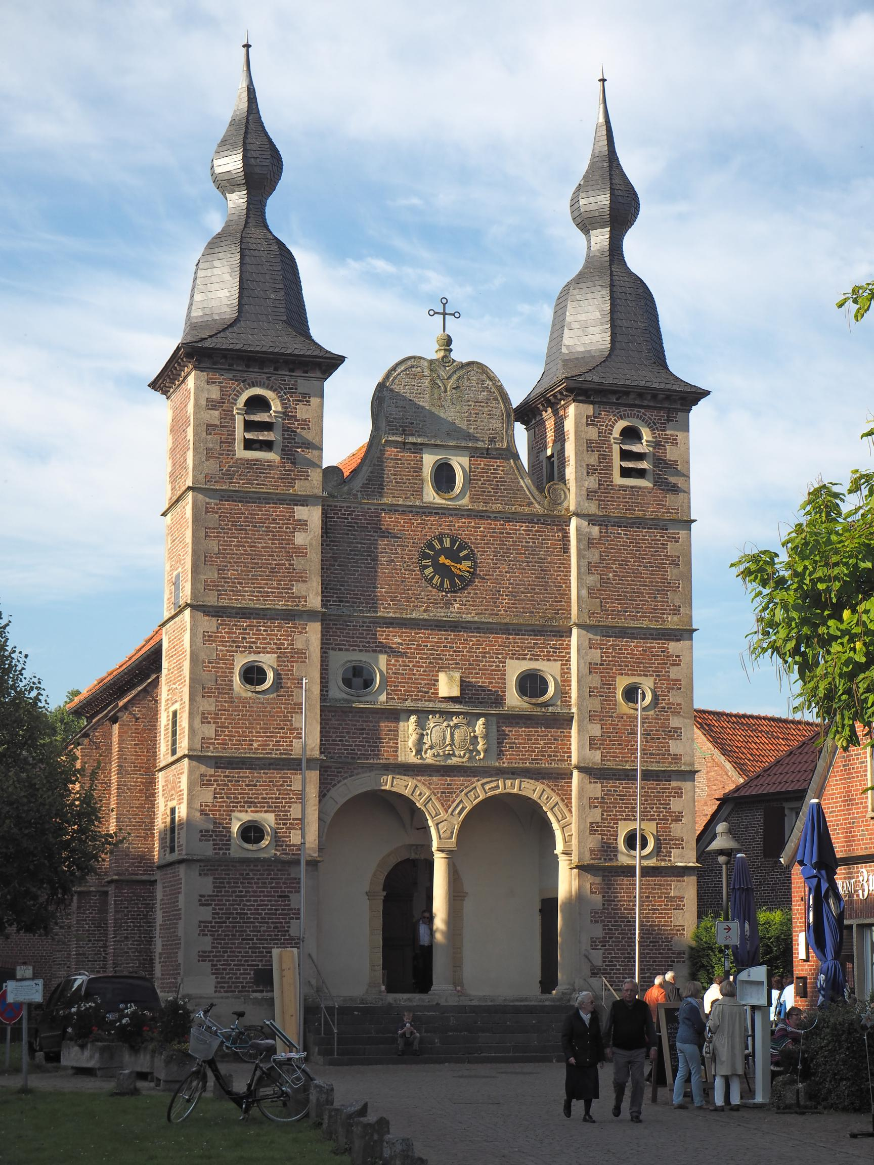 Raesfeld, NRW, Wasserschloss, Schlosskapelle , Foto: Oktober 2015